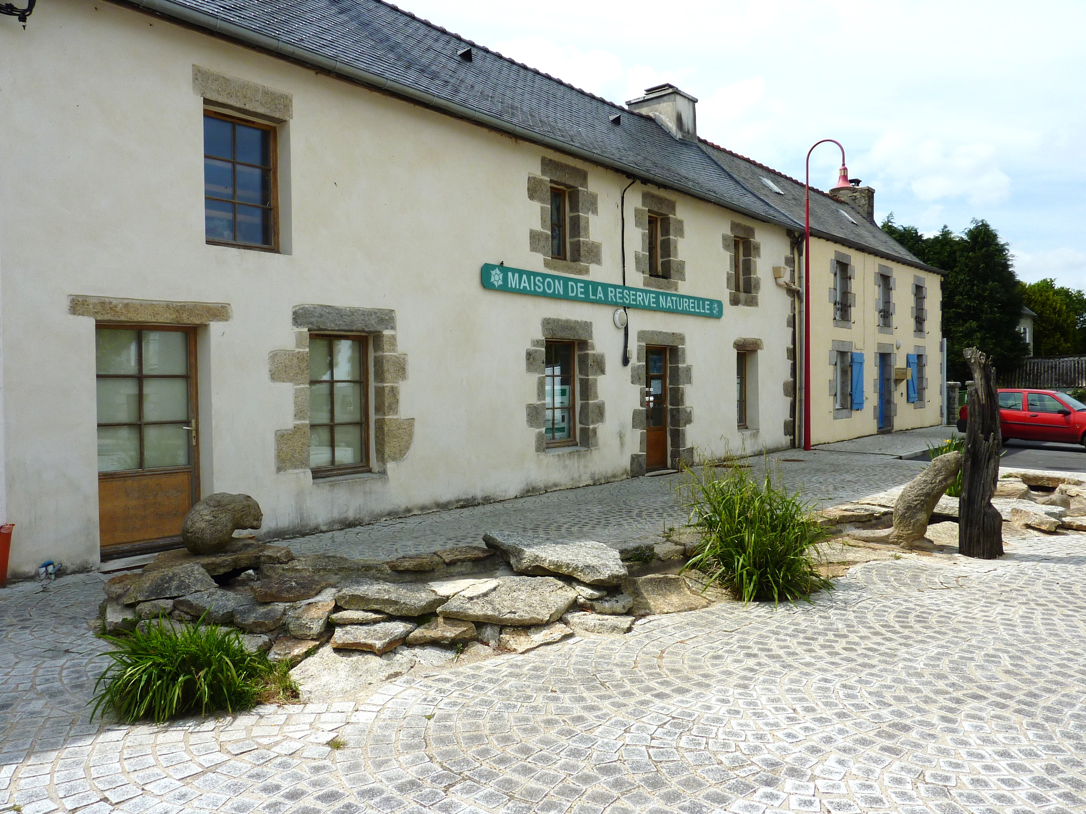 Brennilis: la maison de la Réserve naturelle et des castors (parc naturel régional d'Armorique)